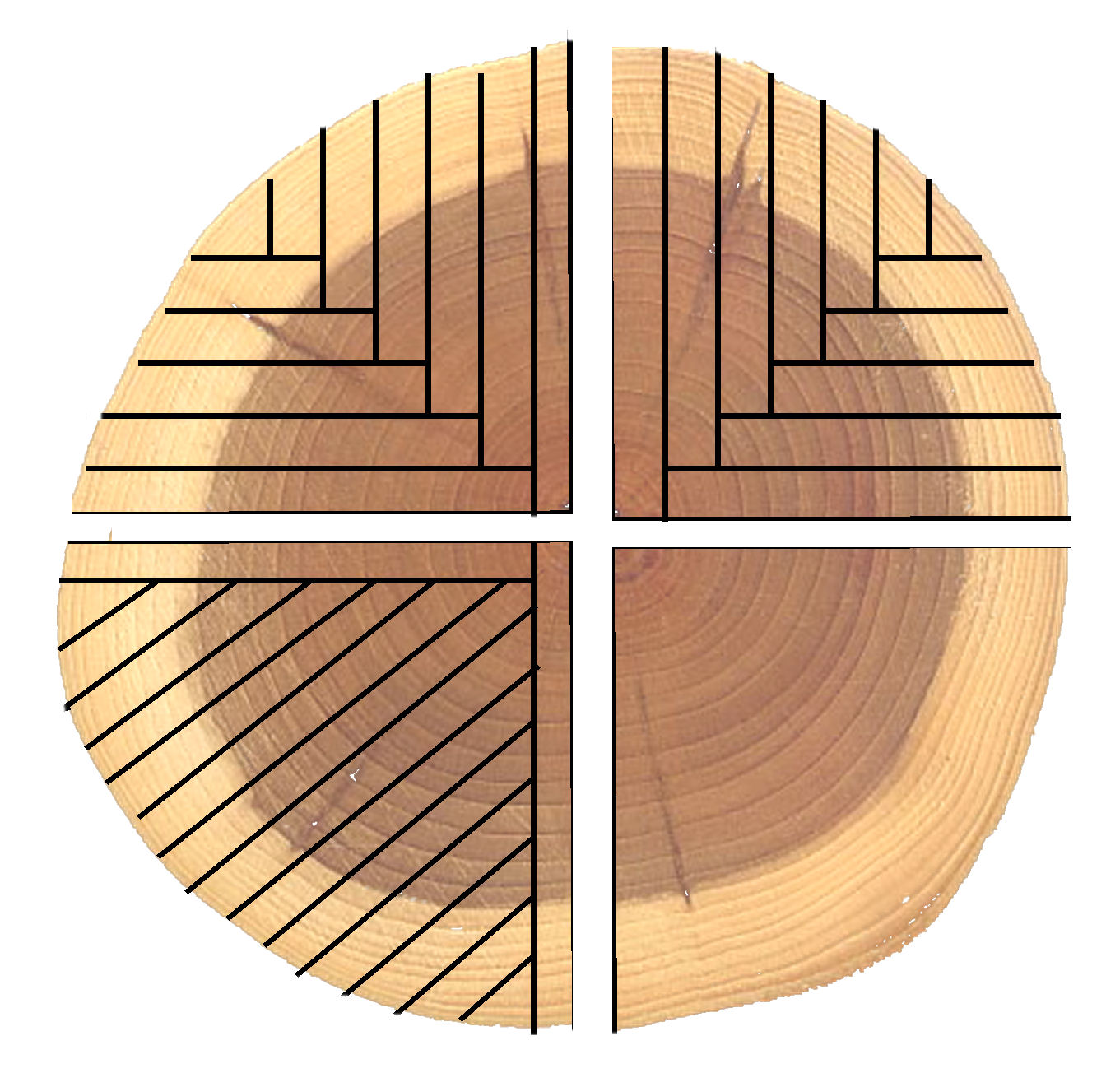 Zagen kwartier: eenvoudige en duurdere wijze